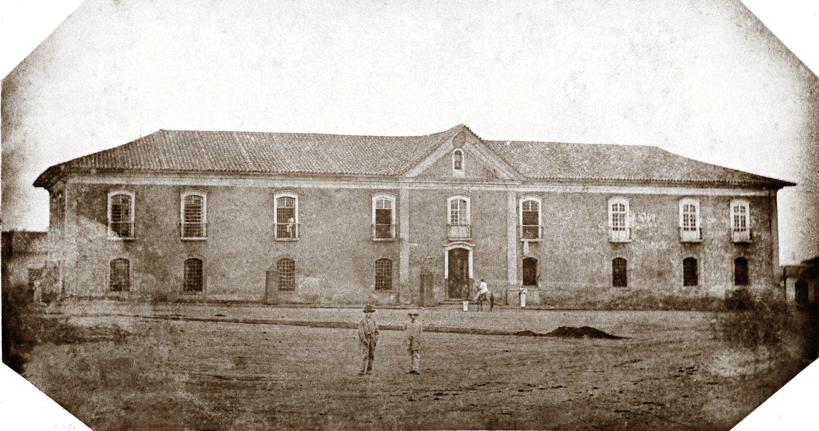 Página 14 do Álbum Comparativo da Cidade de São Paulo. Obra que integra o acervo do Museu Paulista da USP.